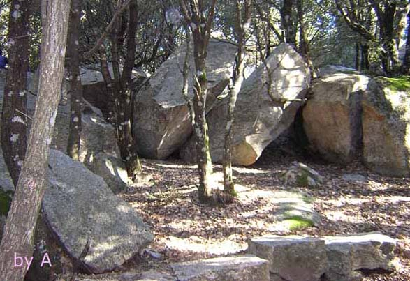 Giovani lecci sul Monte San Basilio, dove uomini senza cuore, rubarono il cuore al granito